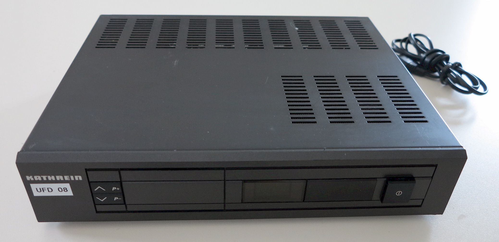 1986-1989 Erster Europäischer Consumer Satellitenempfänger (Grundig STR-200) Kathrein UFD 08 geeignet zum Direktempfang von Analog TV Sat Sendern (Empfang überwiegend der damaligen Eutelsat 13 Grad Ost Sendern SAT1, RTL Luxenburg, MTV-Musicbox, 3 Sat)